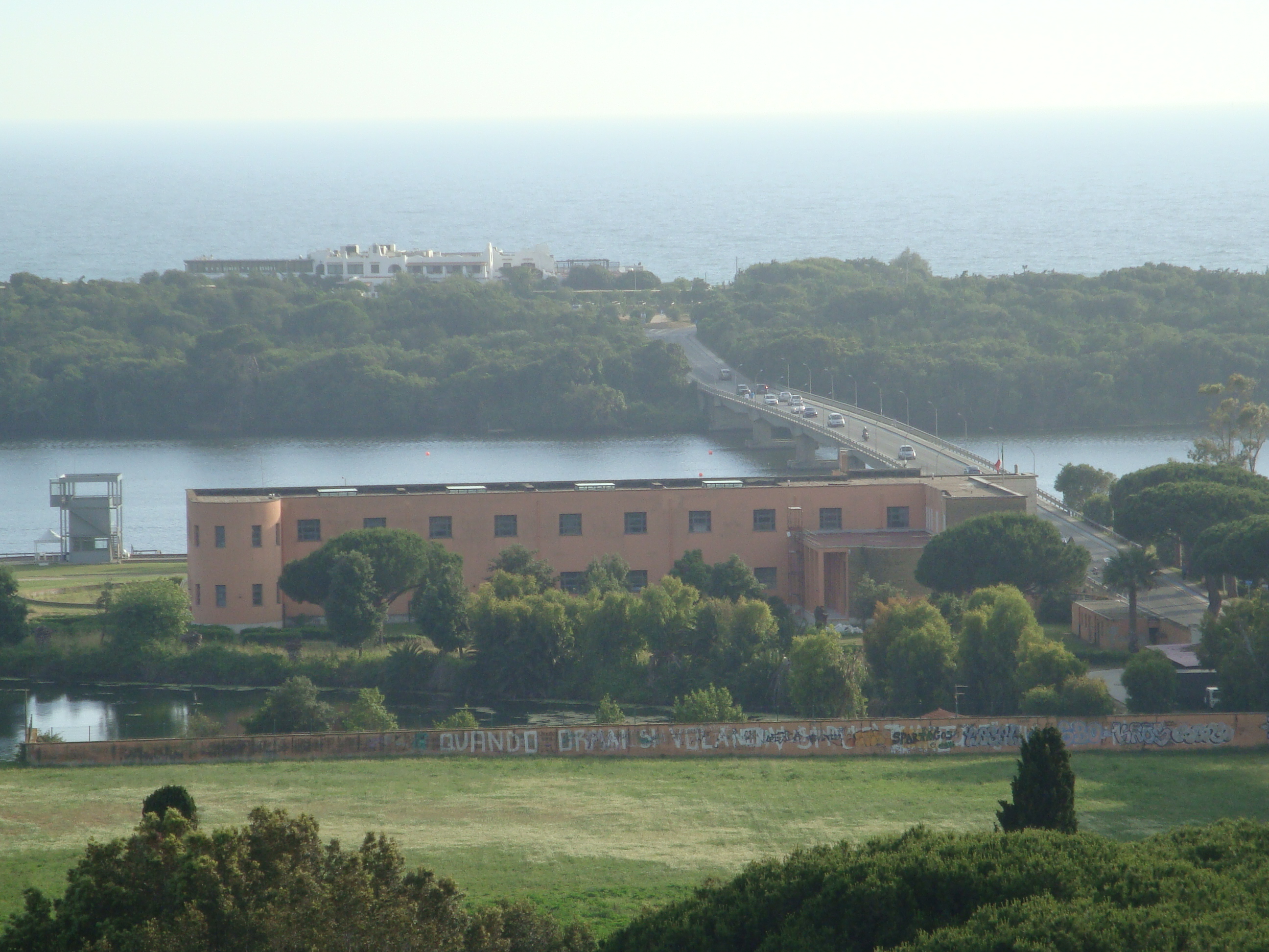 Lago di Paola, visto dalla torre del Comune, attraversato dal Ponte Giovanni XXIII (progetto dell'Ingegner Morandi, 1964).